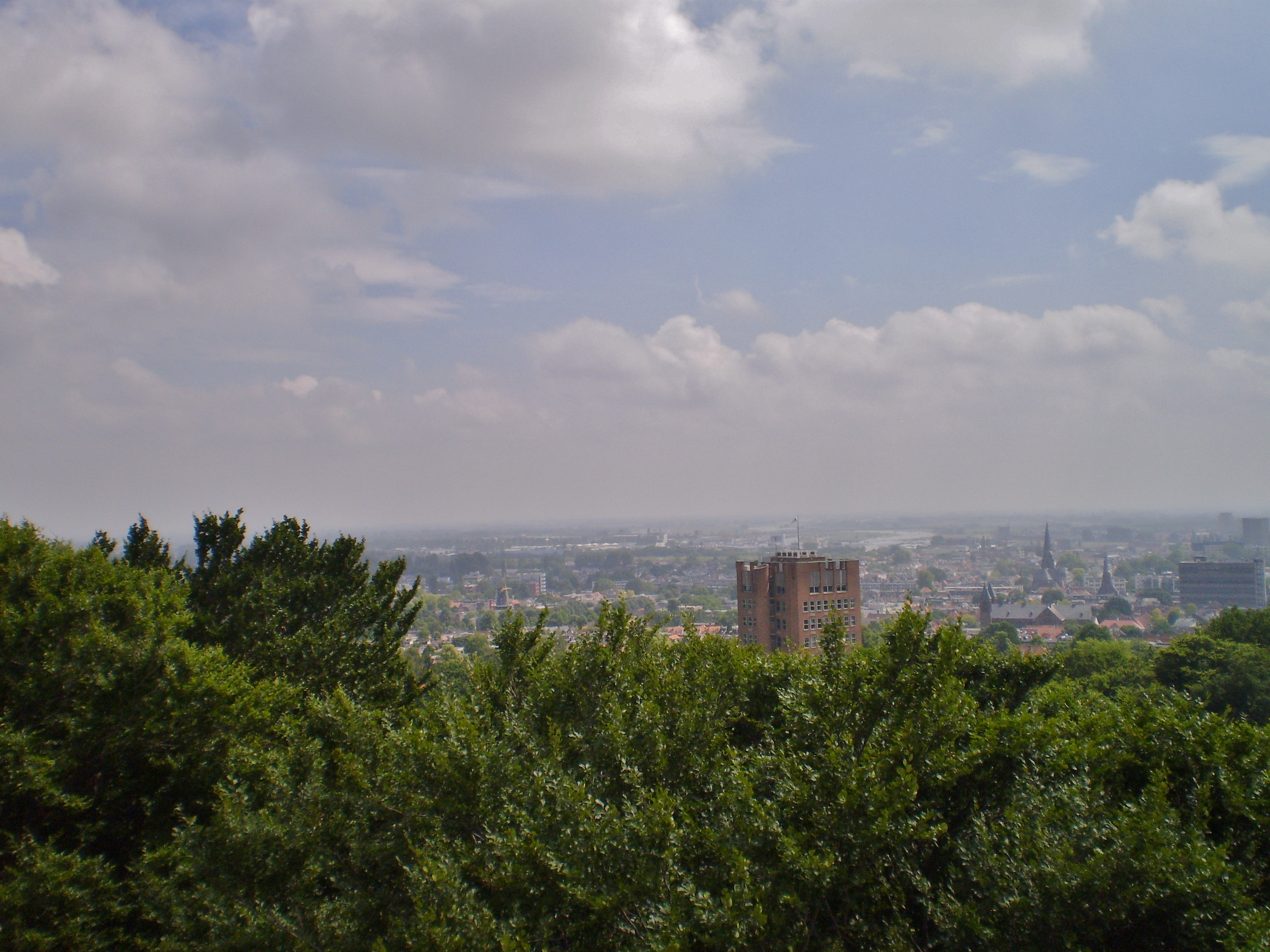 Arnhem vanuit belvedêre Sonsbeek